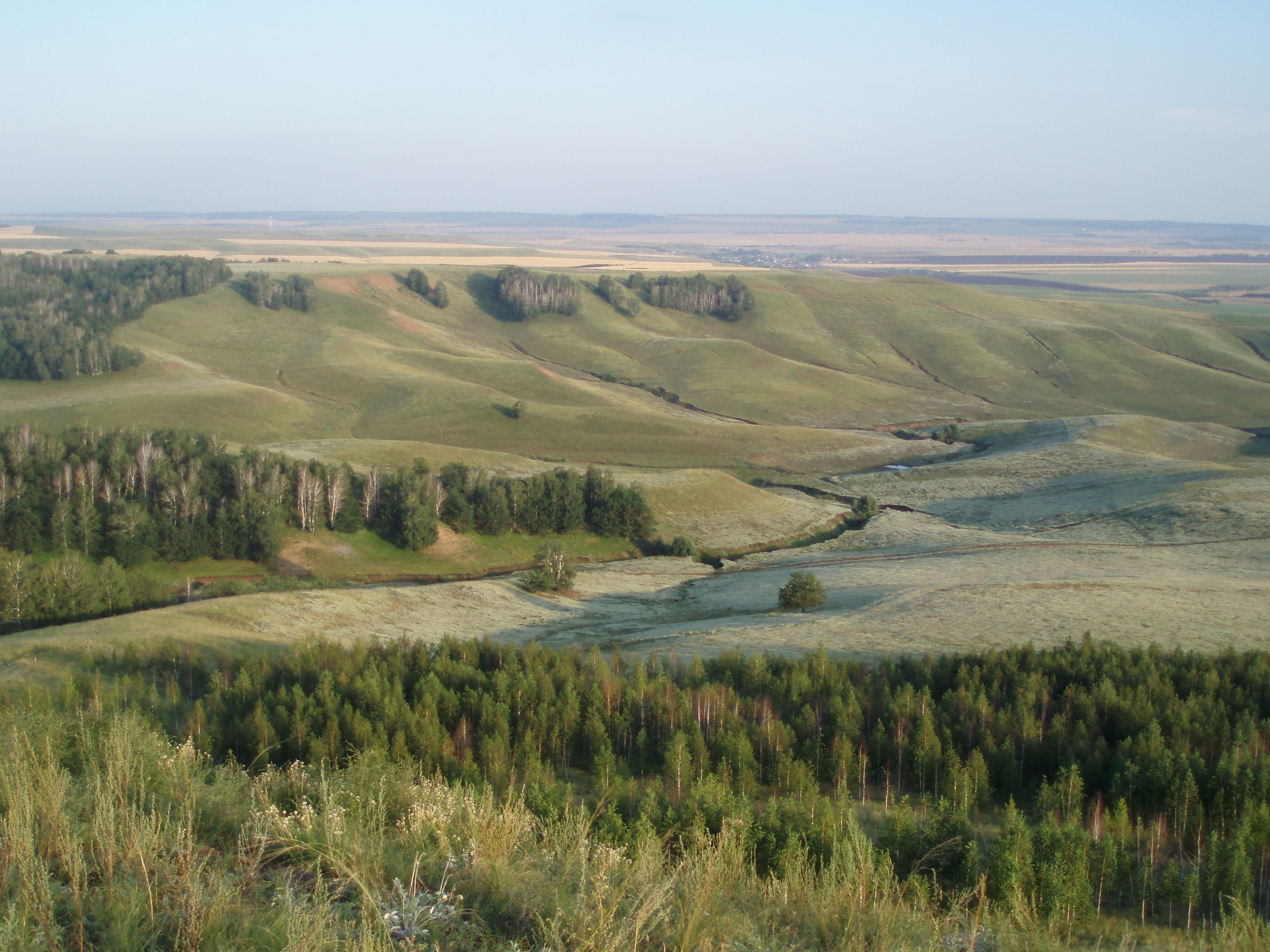 Чатыр-Тау заказник, Азнакаевский район This image is related to the protected area of Russia number 1610010